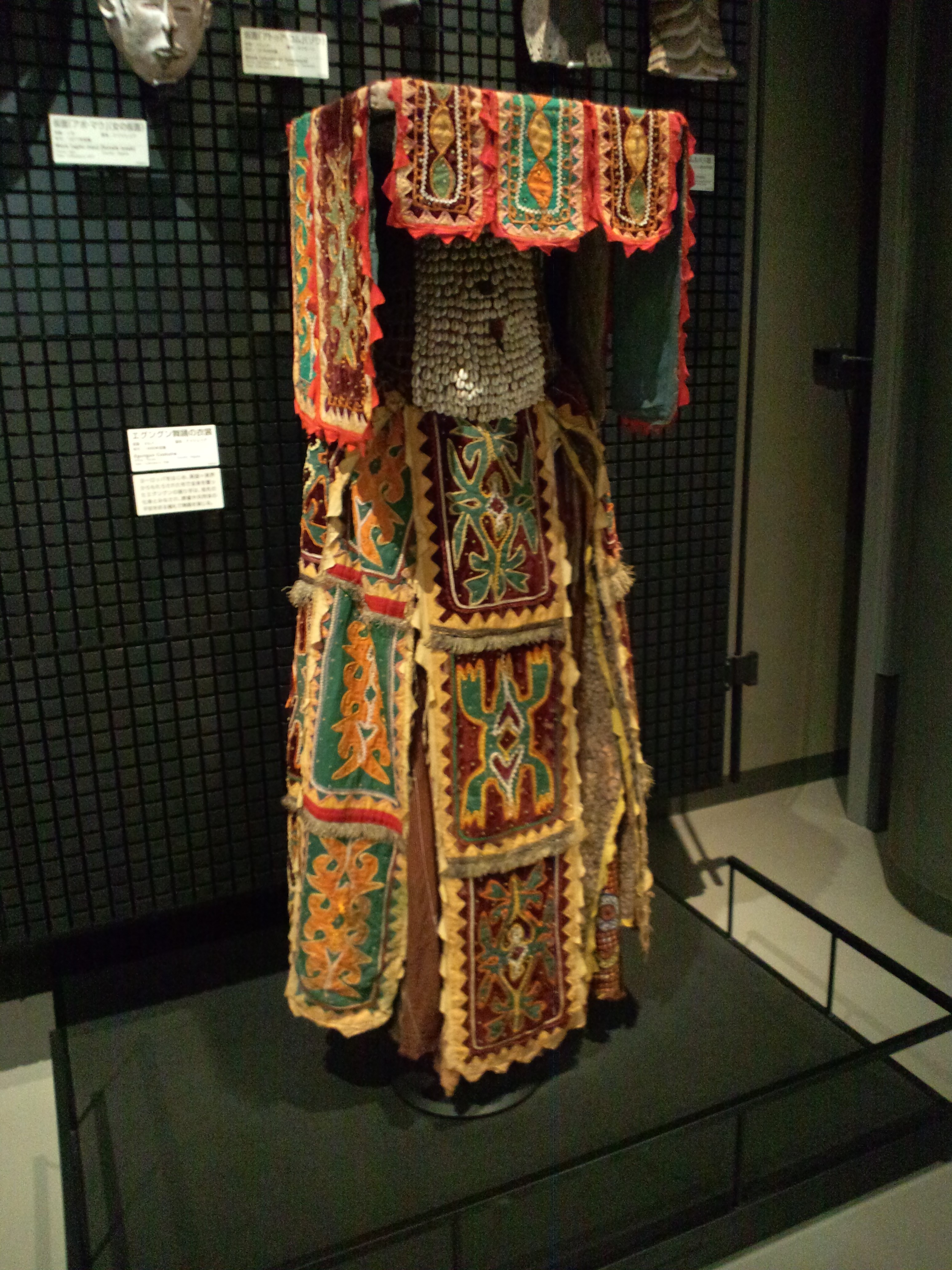 国立民族学博物館（大阪） エグングン舞踏の衣装（ナイジェリア、ヨルバ族、1996年収集）